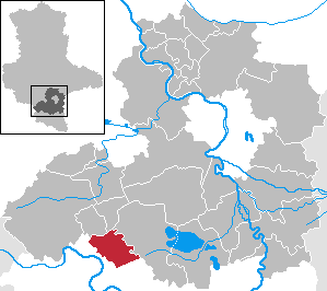 Steigra in Saxony-Anhalt - Saalekreis